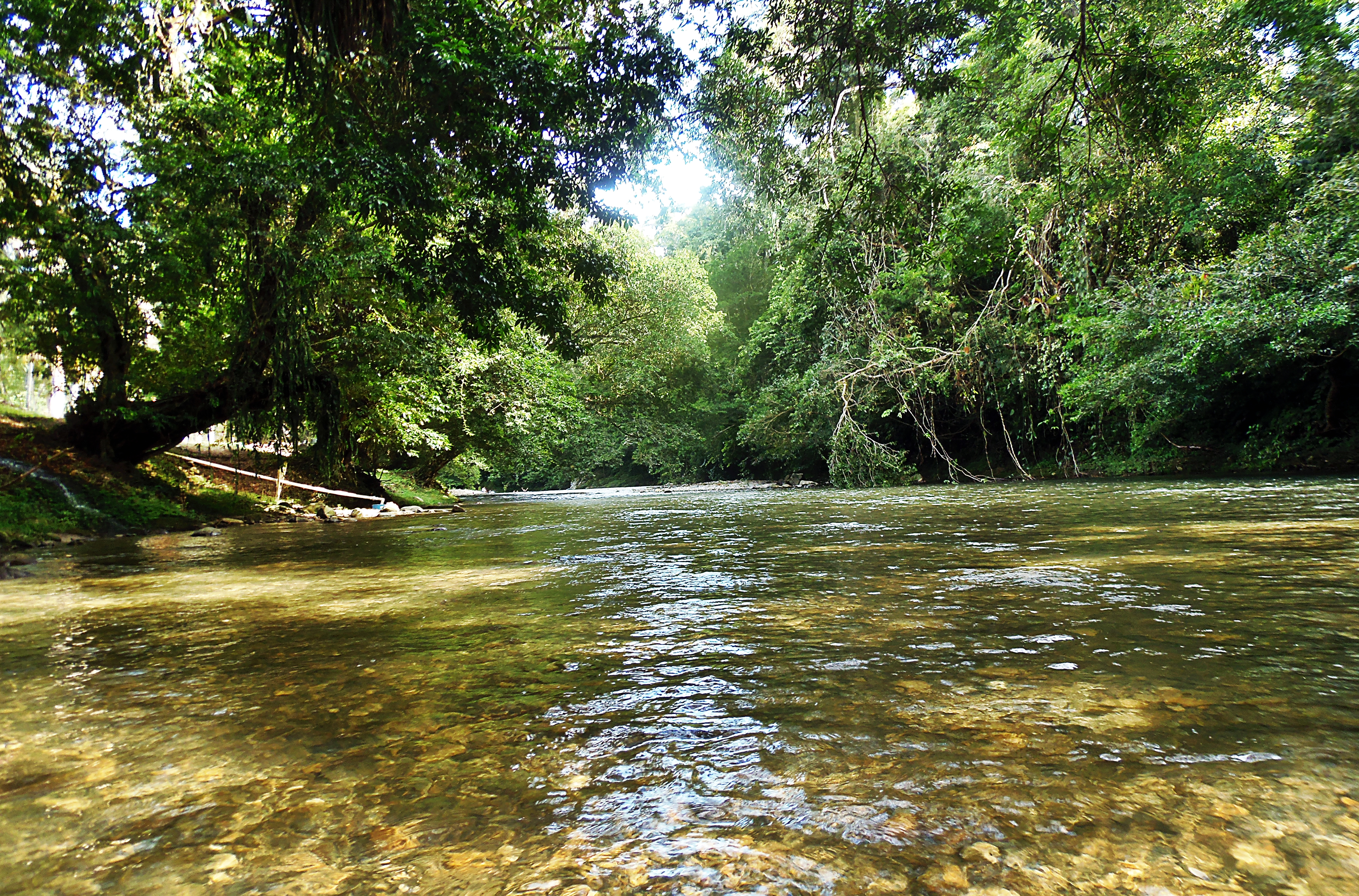 Rio Jilamito Arizona Atlantida Honduras